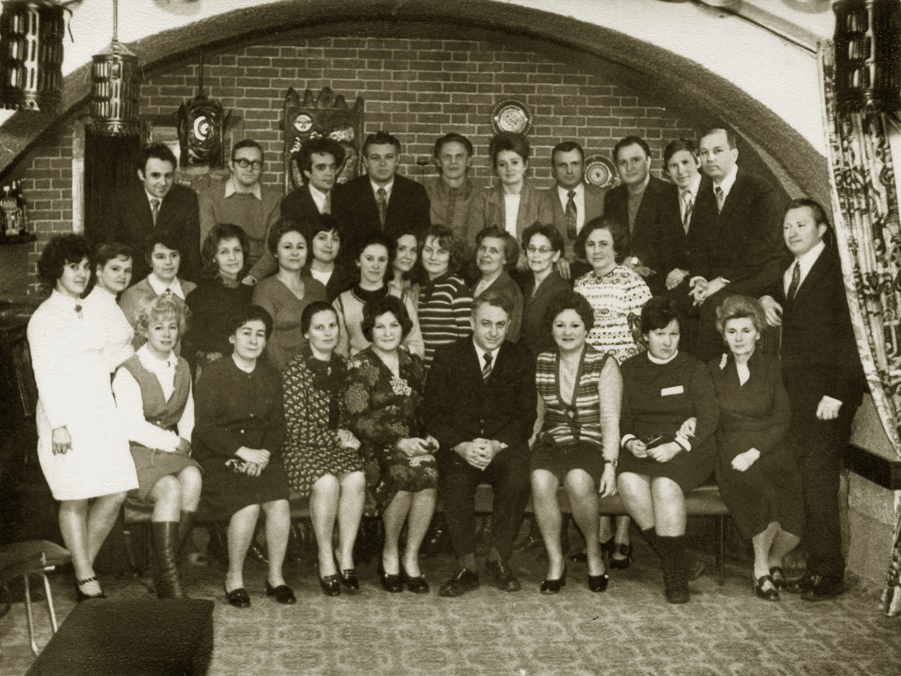 Сотрудники кафедры пропедевтики детских болезней Ленинградского педиатрического института во главе с профессором И. М. Воронцовым